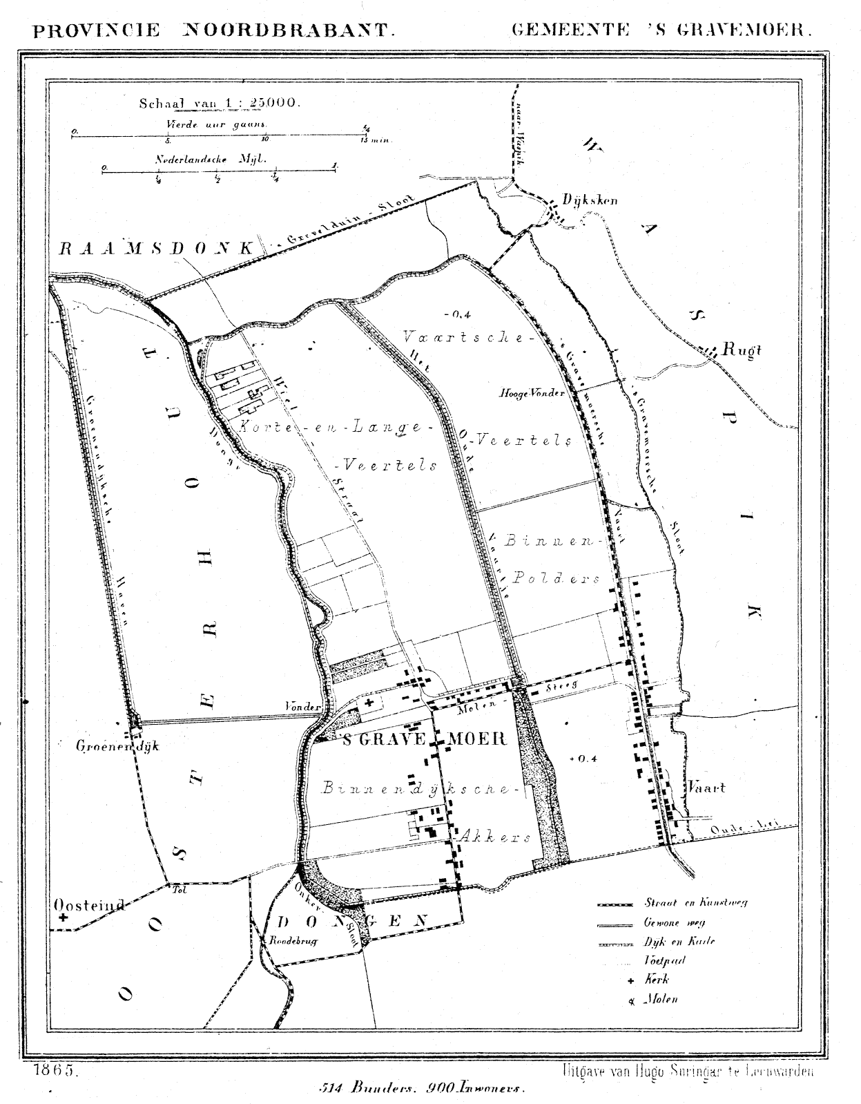 Nederland, Noord-Brabant, Gemeente 's-Gravemoer